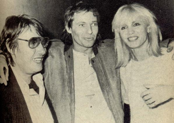 Fabrizio de Andrè e Dori Ghezzi visitano Vasco in carcere